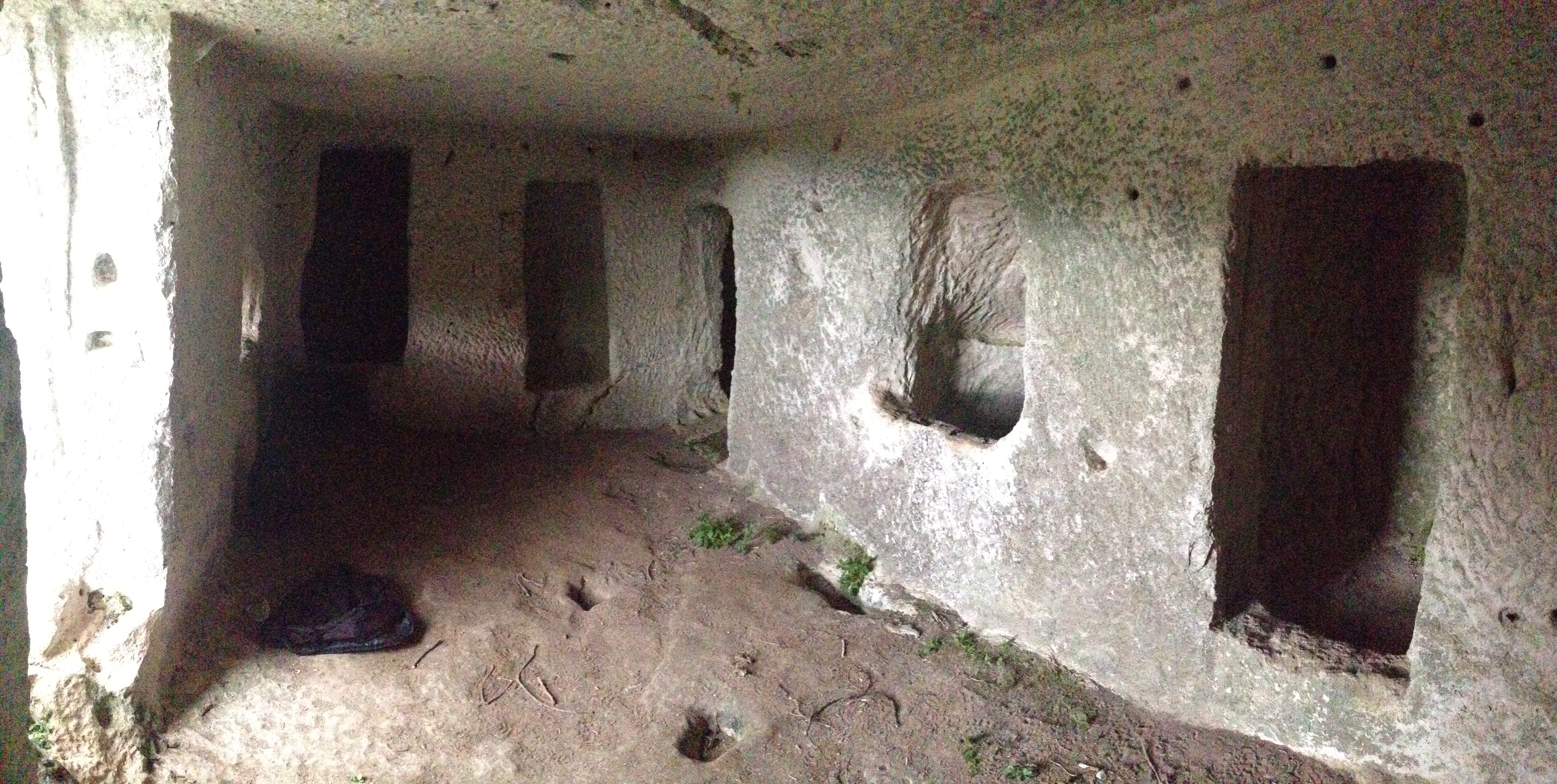 Ambiente